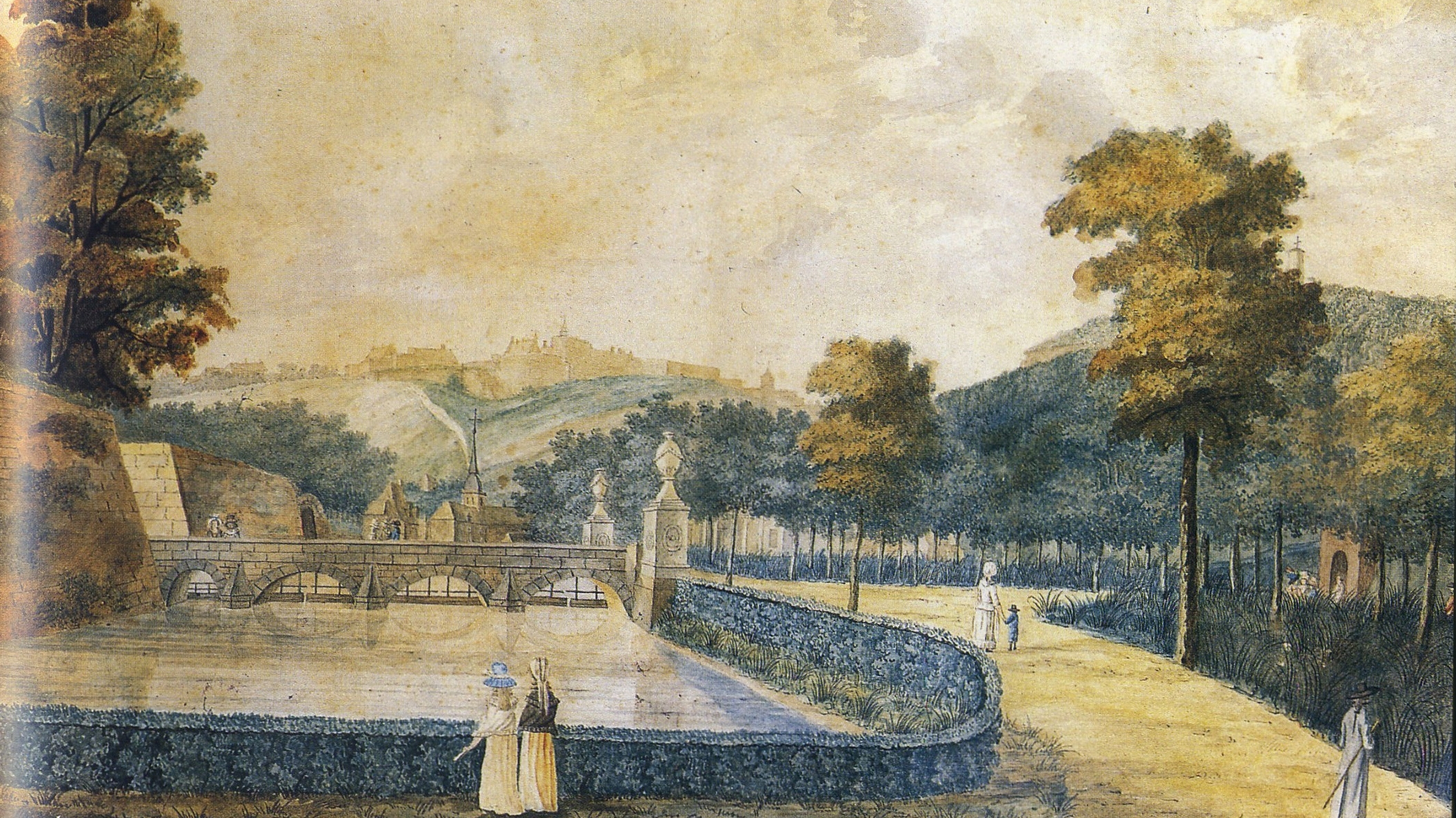 Pont enjambant le bras du Doubs qui traversait le parc de Chamars (Besançon) au XVIIIème siècle